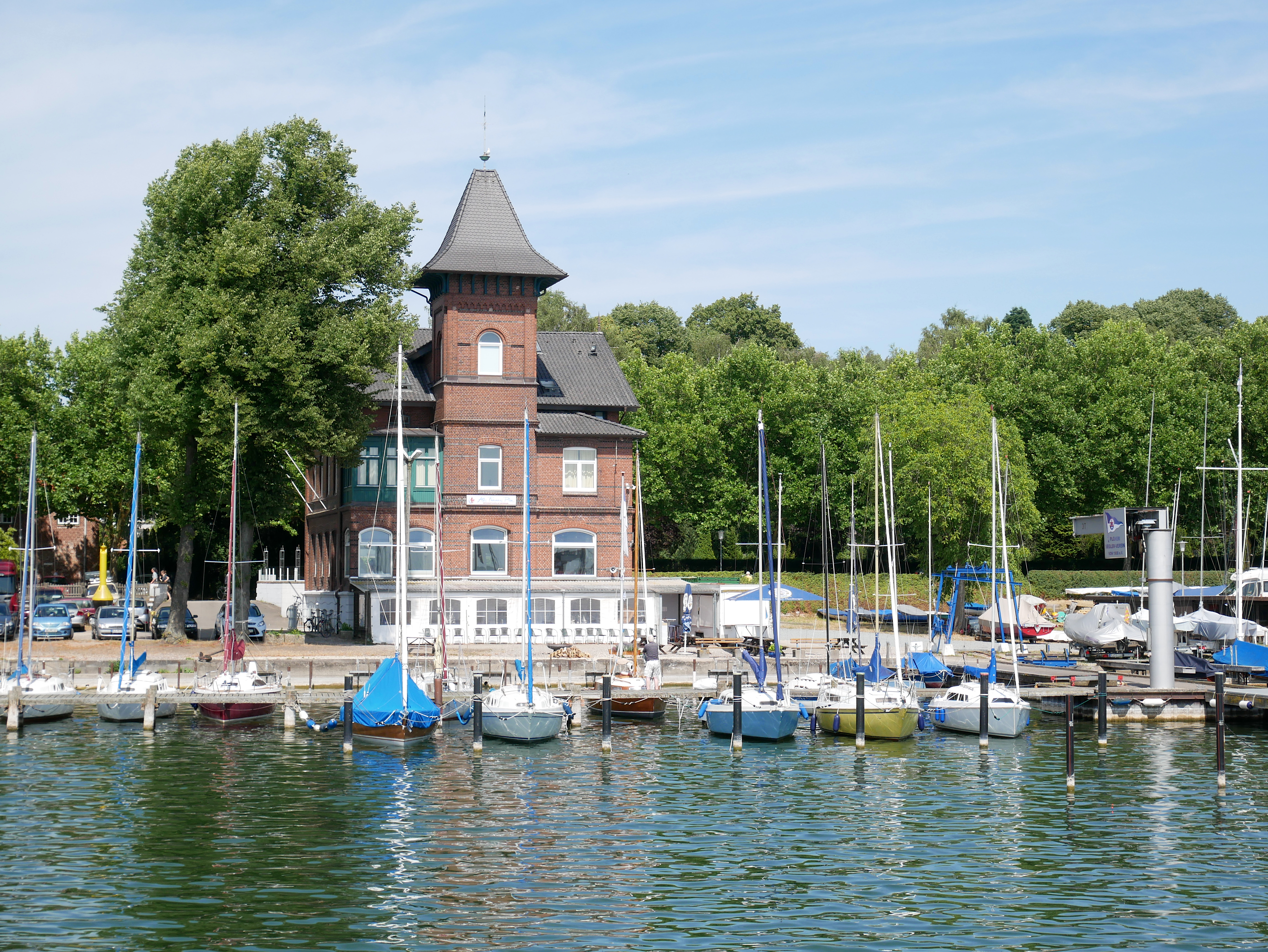 ehemalige Biologische Station in Plön, begründet von Otto Zacharias